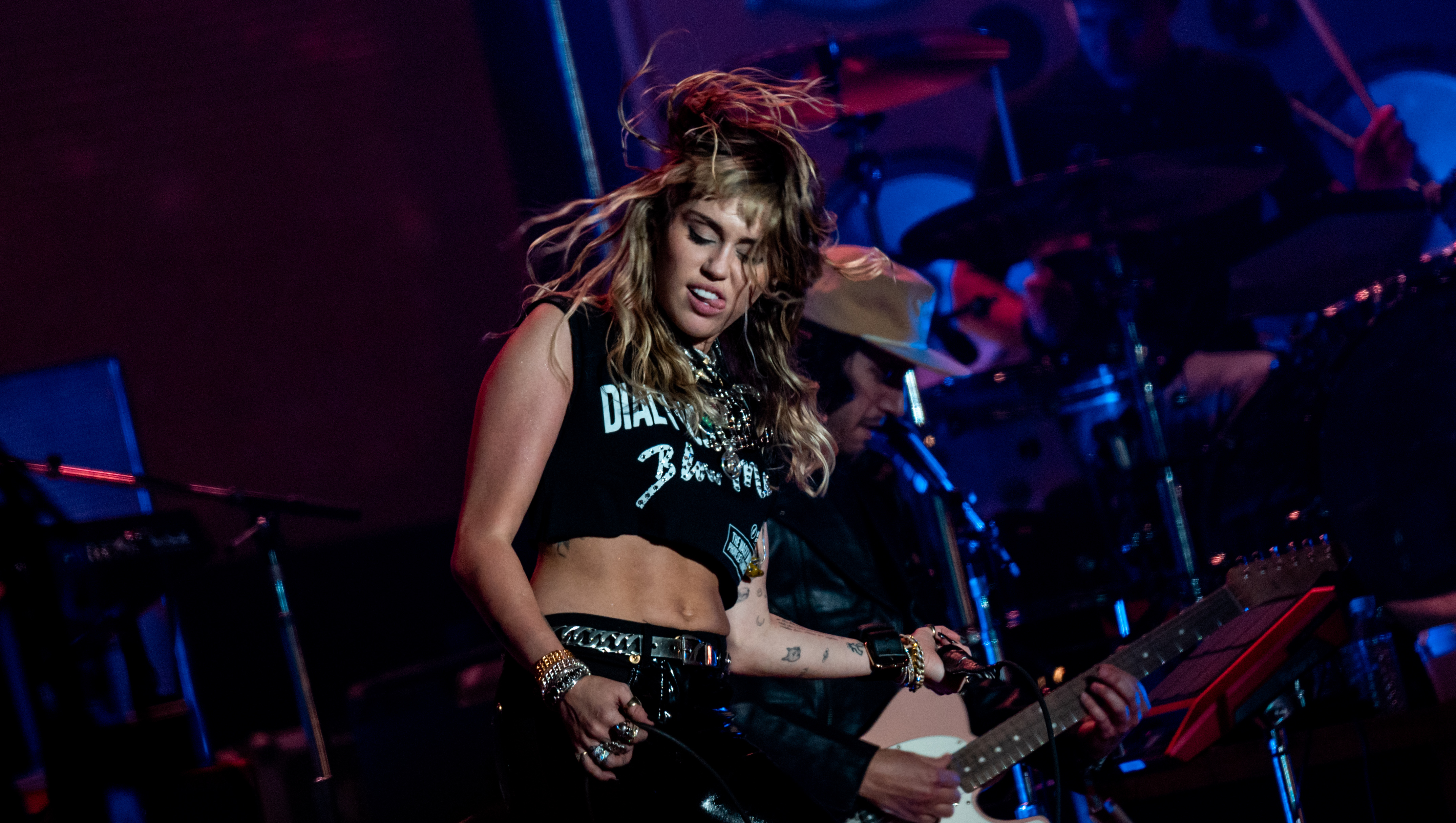 Primavera19_-221